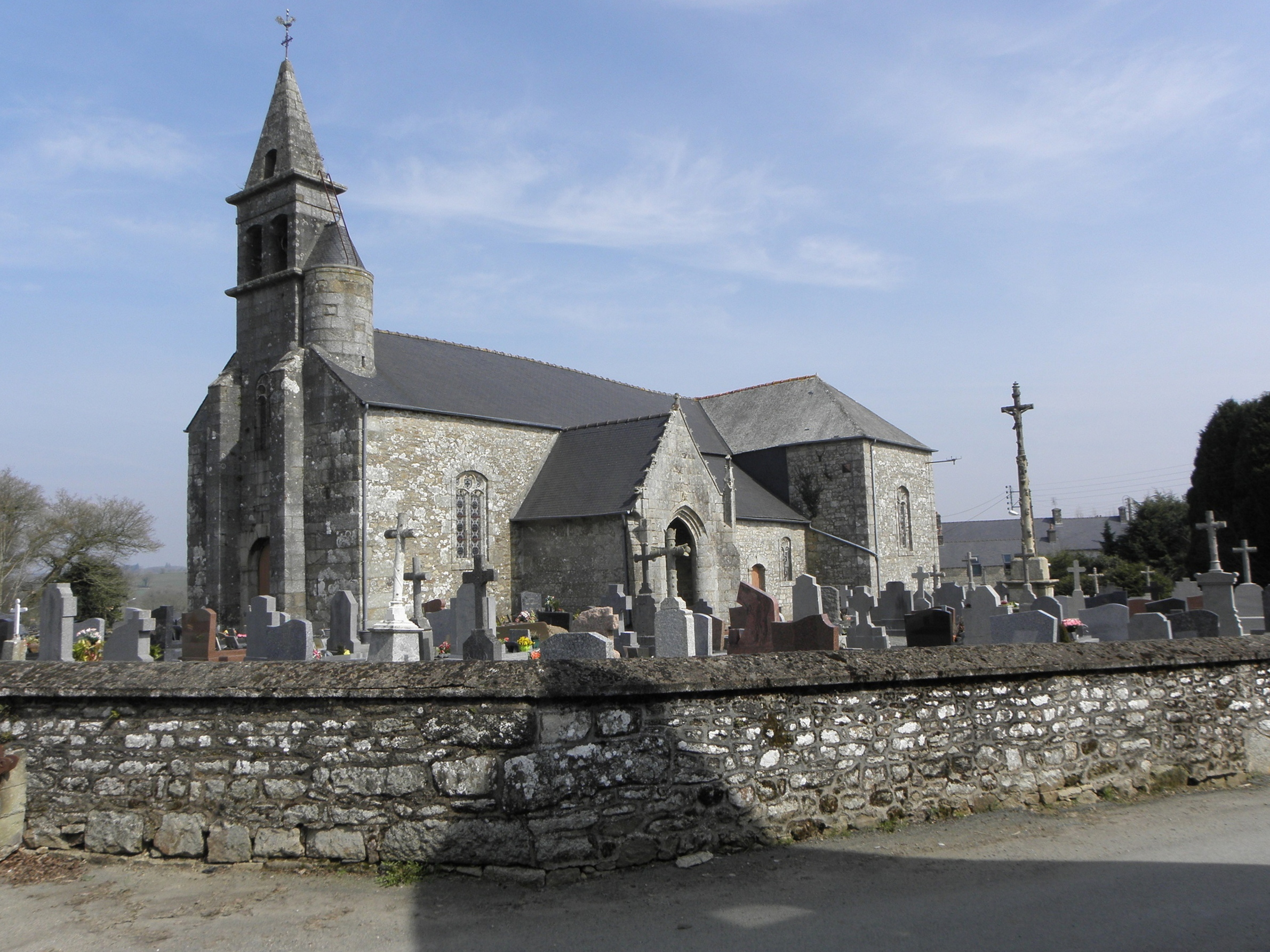 de l'église Saint-Pierre à Kerien (22).